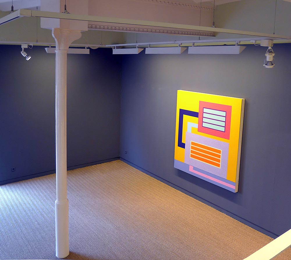 galería SENDA expone la obra de Peter Halley, "Prision", en el 2012.